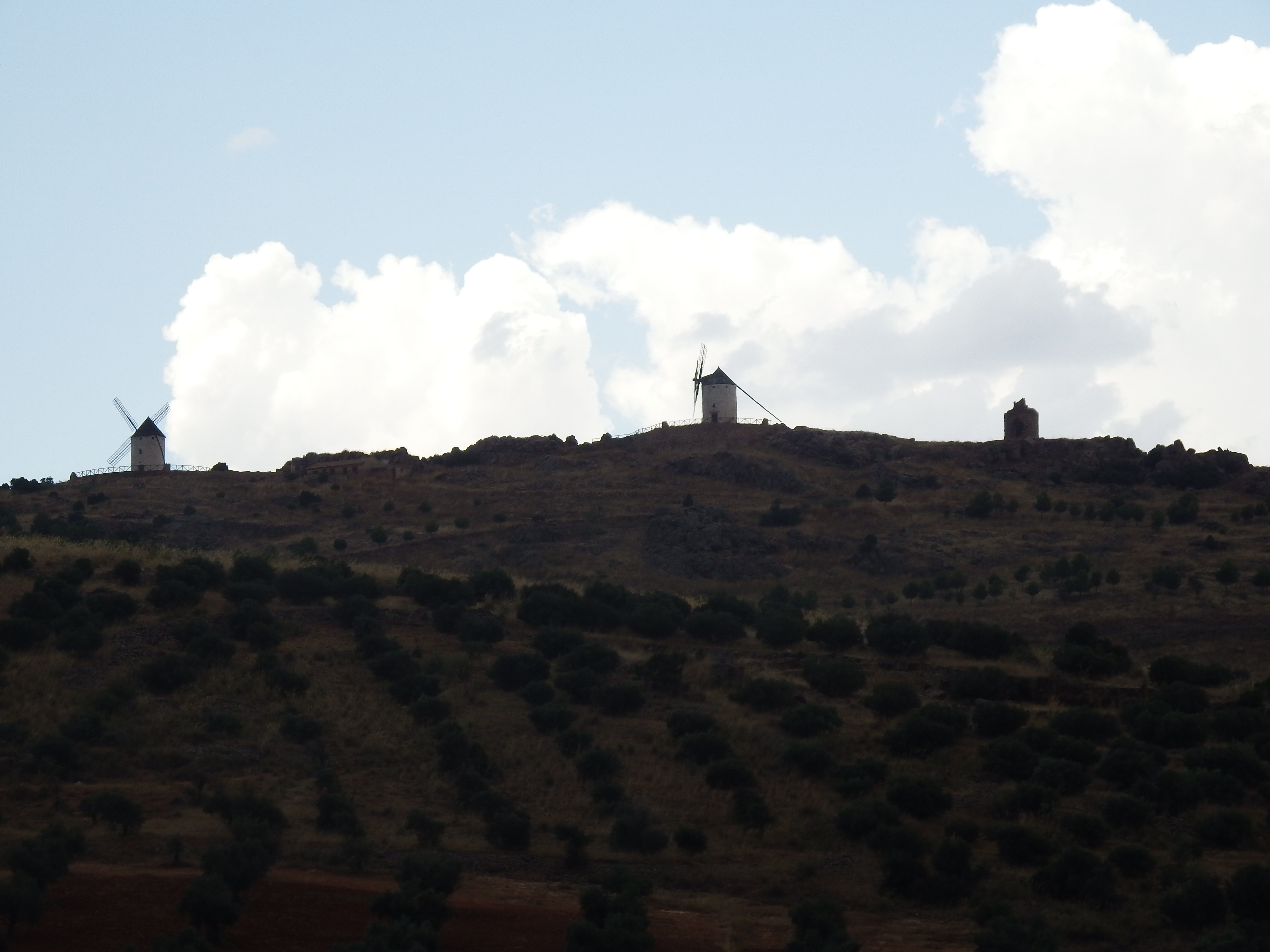 Molinos de viento típicos de Castilla.